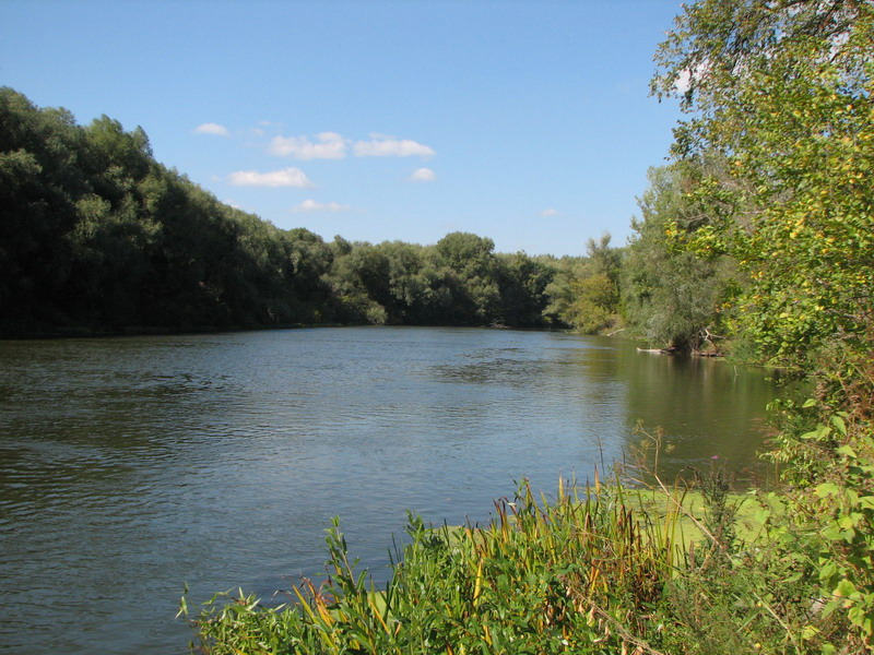 Severskiy Donec near Shepilivka, Ukraine